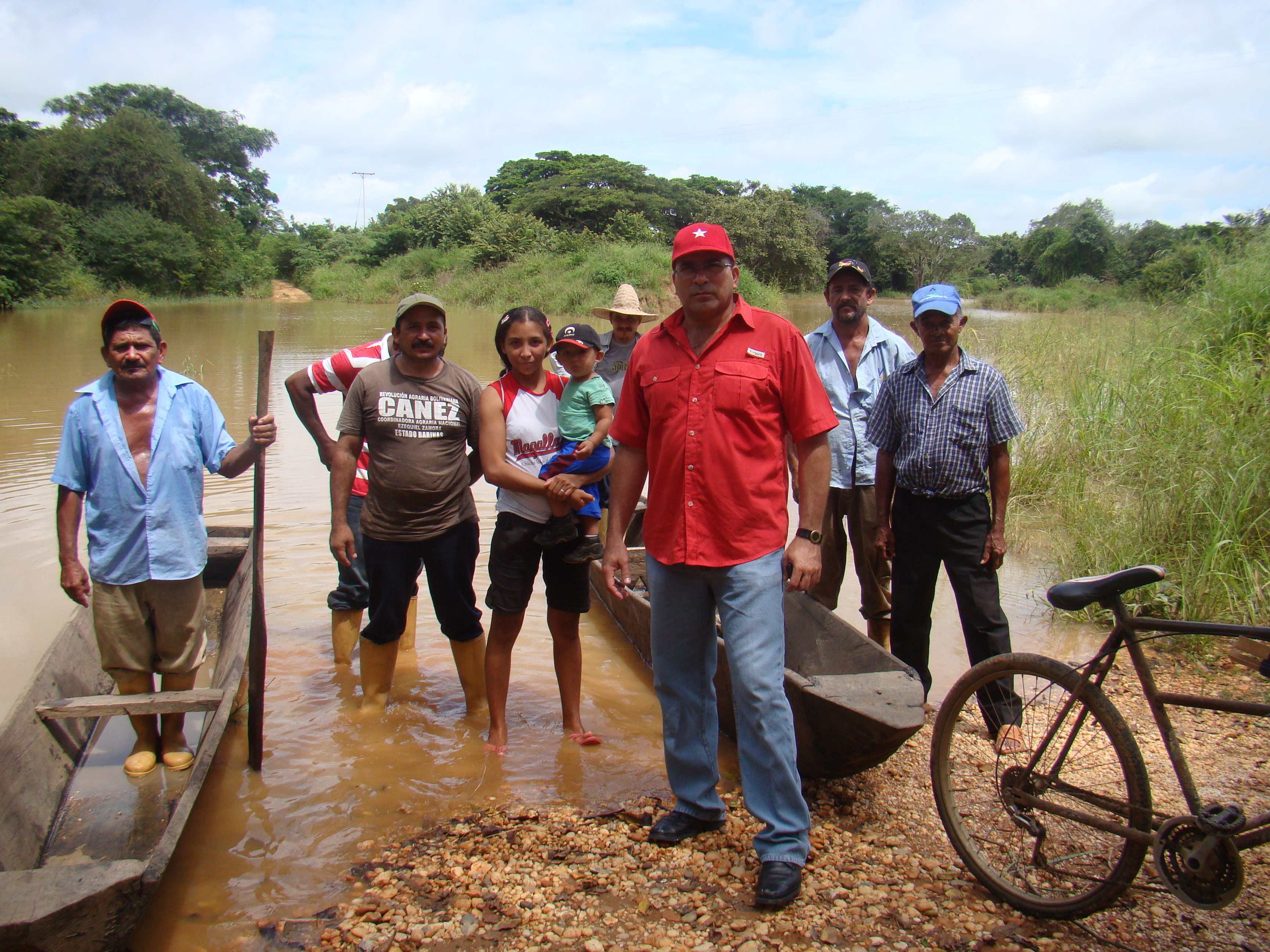 gestion social porfirio oropeza